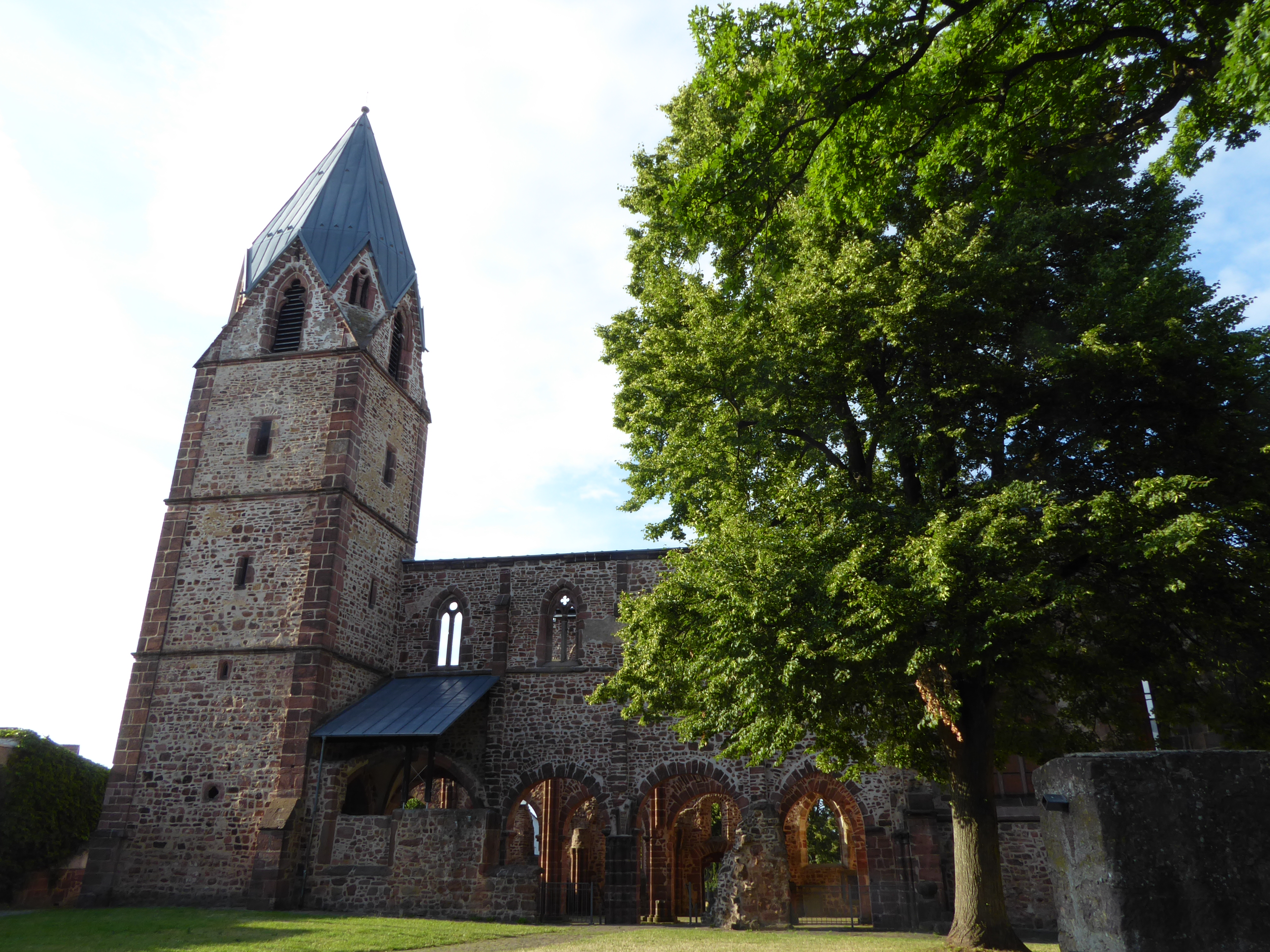 Ruine der Kirche St. Martin in Treysa, Totenkirche genannt